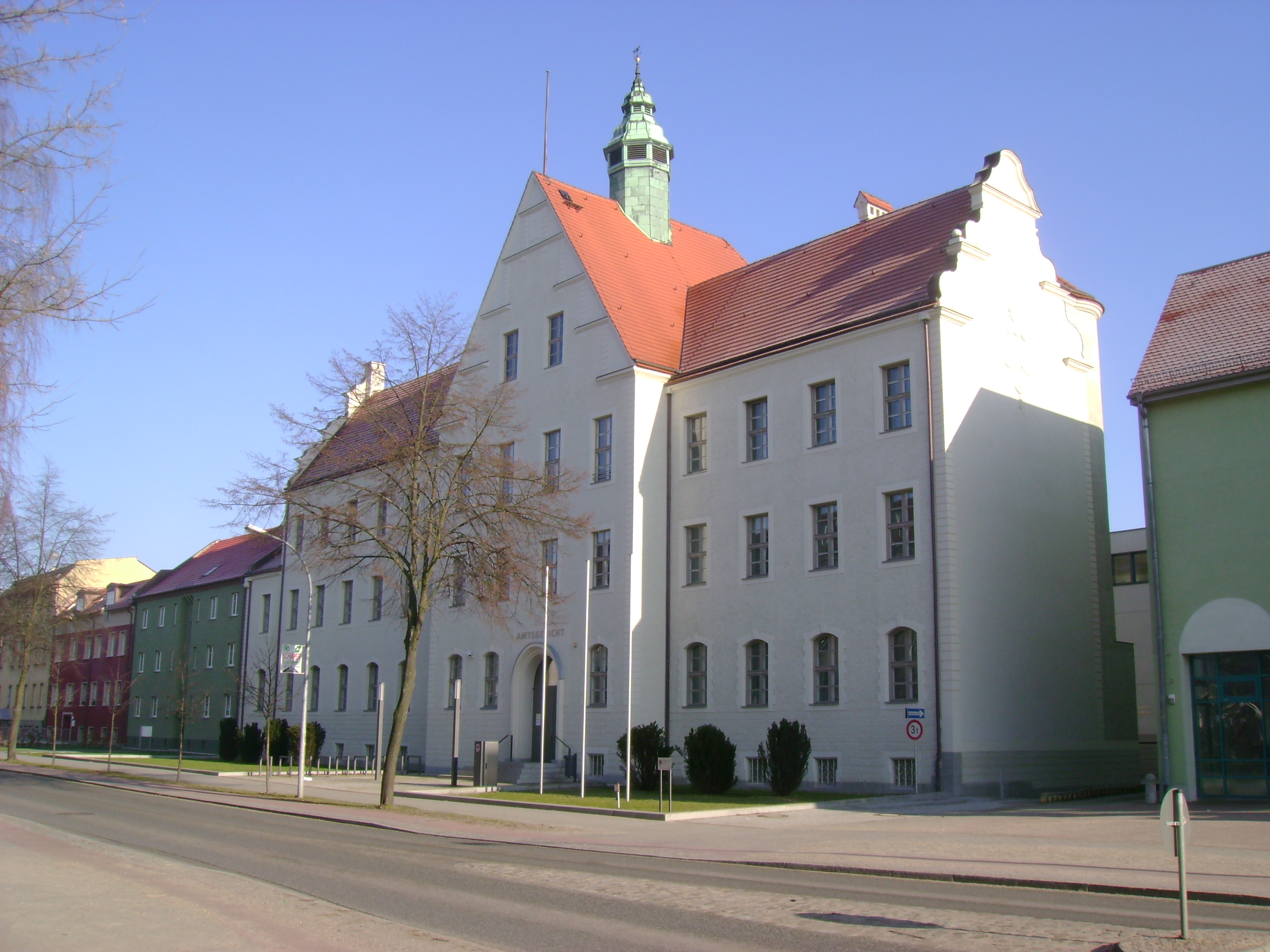 Amtsgericht Oranienburg, denkmalgeschütztes Gebäude an der Berliner Straße